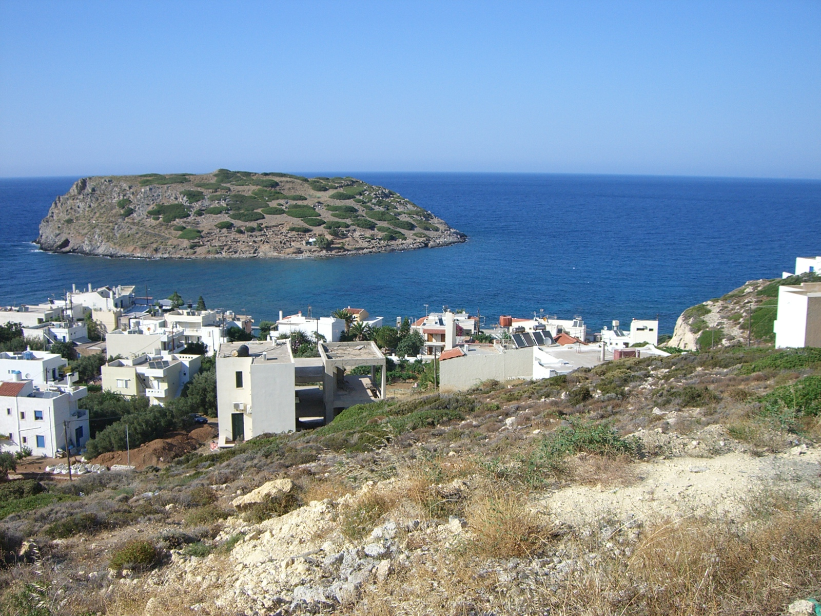 Mochlos, Dorf in Ostkreta